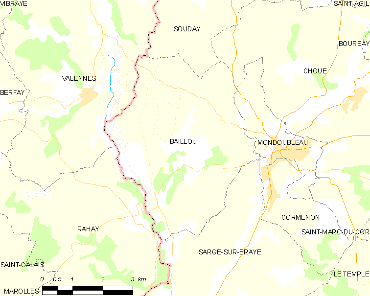 Carte des communes de France, centrée sur Baillou (Loir-et-Cher, code Insee 41012